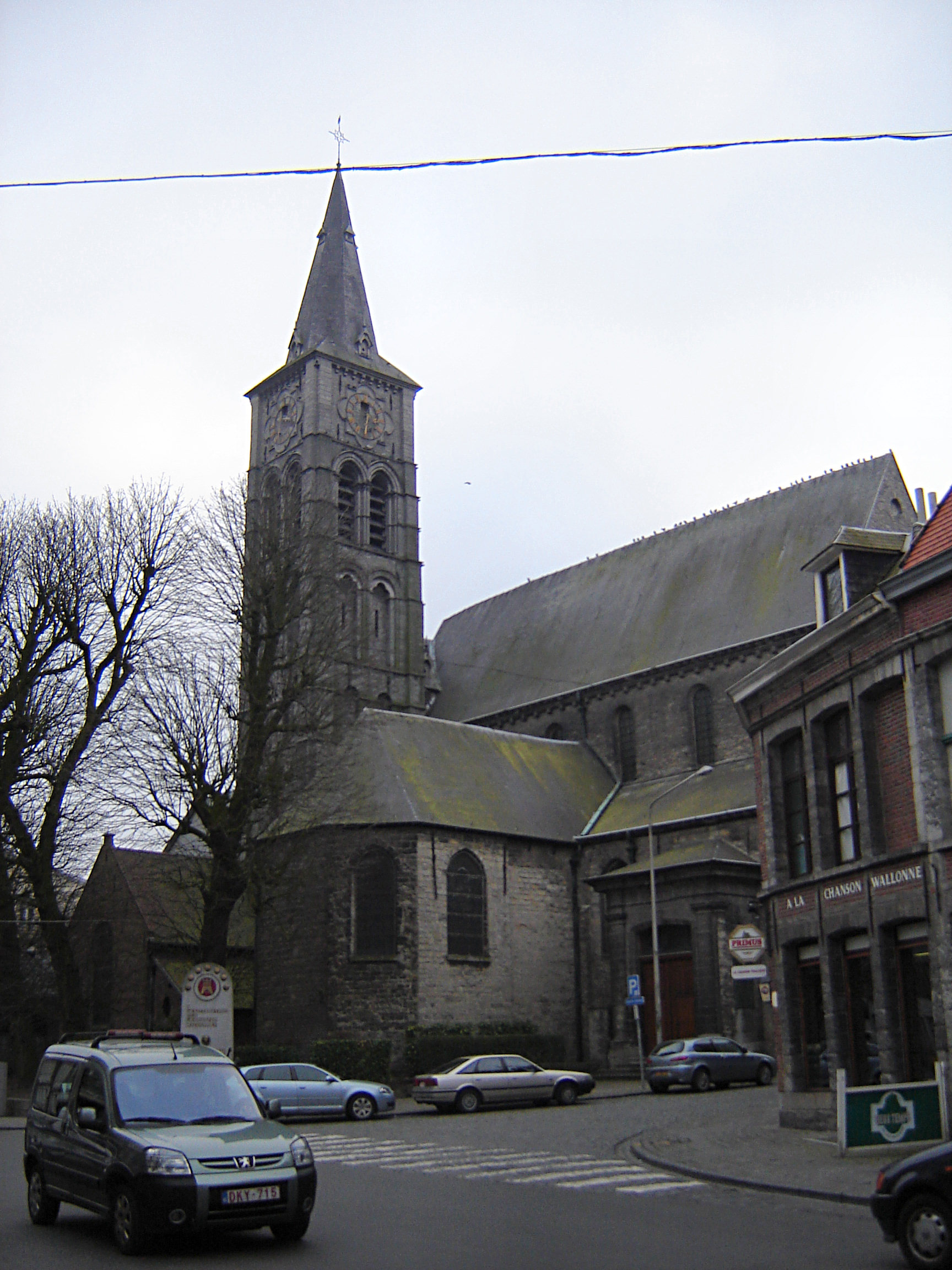 Eglise Saint-Piat in Tournai, Hainaut, Belgium